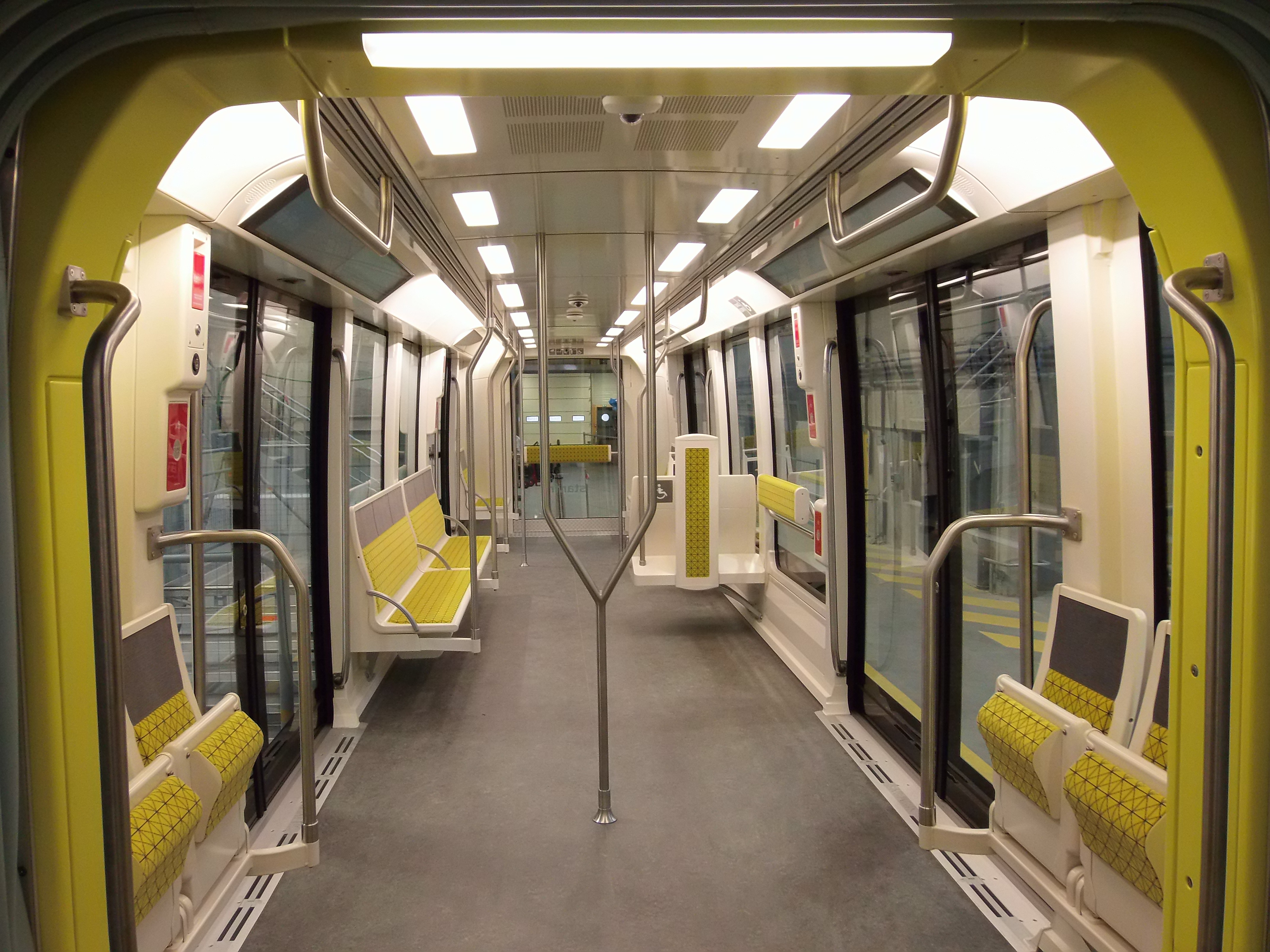 Intérieur de la rame. Photo prise lors des portes ouvertes de l'atelier du métro ligne B de Rennes, à Saint-Jacques-de-la-Lande.